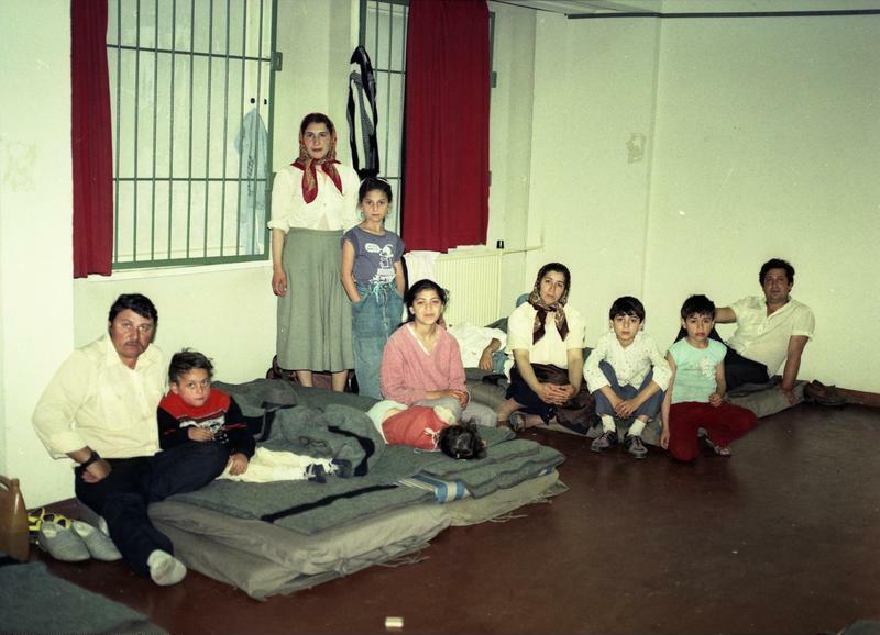 Berlin, Rumänische Asylanten Berlin: Rumänische Arbeiter Spärlich ist die Behausung - aber es ist eine erste Unterkunft für 600 Rumänische Bürger, die in der DDR Asyl suchen. Seit Monaten campierten sie auf dem Lichtenberger Bahnhof unter unmenschlichen Bedingungen und zum Leidwesen de Fahrgäste. Nun ist ein Teil der Frauen, Männer und Kinder in der ehemaligen NVA-Kaserne in Berlin Kaulsdorf untergekommen. Hier erhalten sie wenigstens eine Bleibe für die Nacht und drei kostenlose Mahlzeiten täglich. Sie kamen als Touristen, deren Ziel der Westen war, um sich dort eine Existenz fern von Hunger und Nöten aufzubauen. Dort schob man sie aber als unerwünscht ab. Nun sind sie wieder in Ostberlin - auf der Suche nach Arbeit und einem menschenwürdigerem Leben.